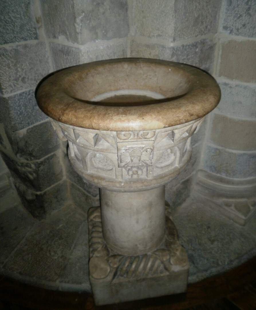 Iglesia de San Nicolás (Pamplona)